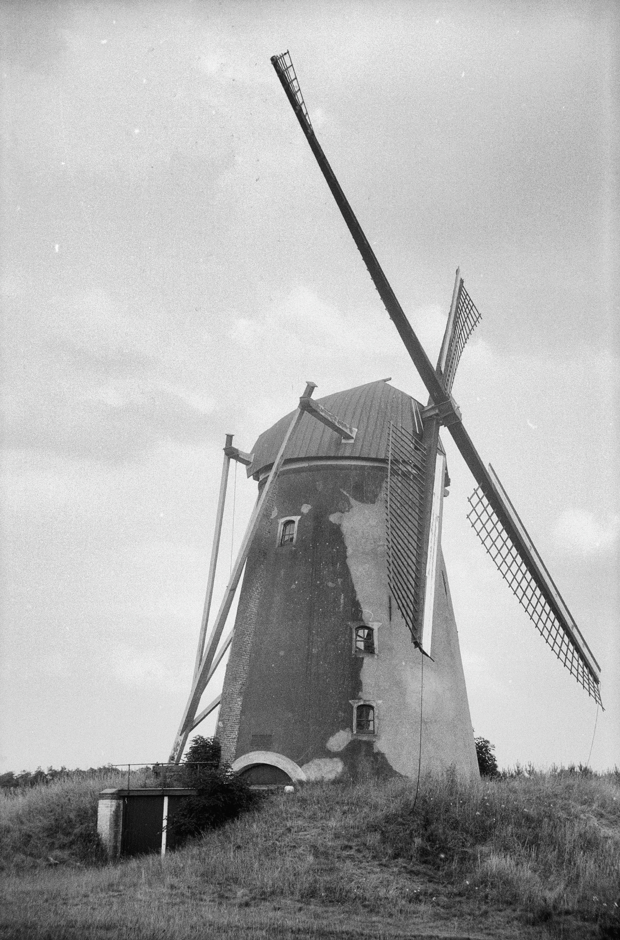 Diversen: Hernense molen